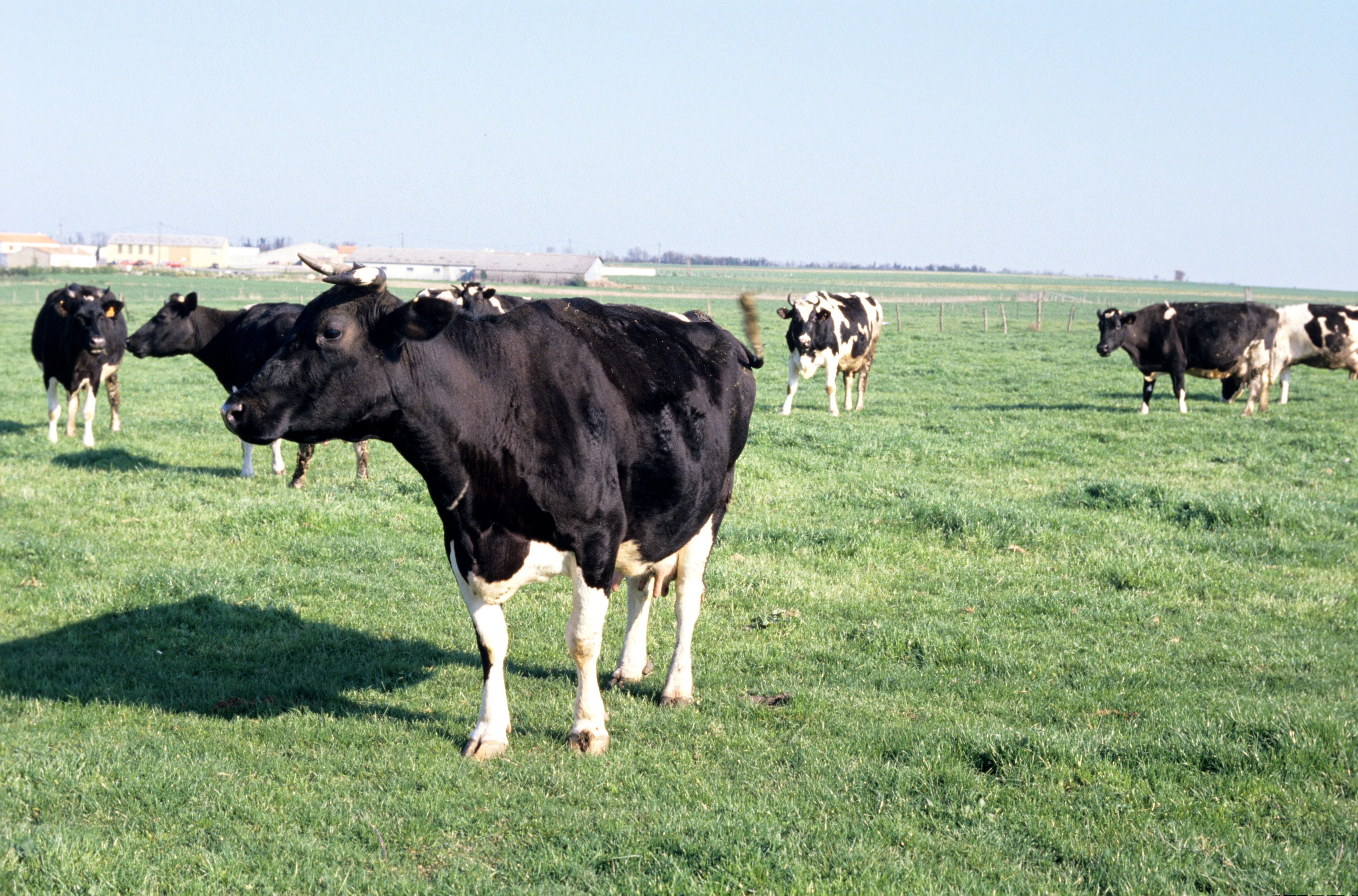 Un troupeau de vaches laitières dans un pâturage. Il est composé de vaches Holstein (appelées Prim Holstein en France). La vache Holstein est par excellence la vache à lait. Photographie prise dans le Marais de la Brie (au nord de La Rochelle), Charente Maritime, France.